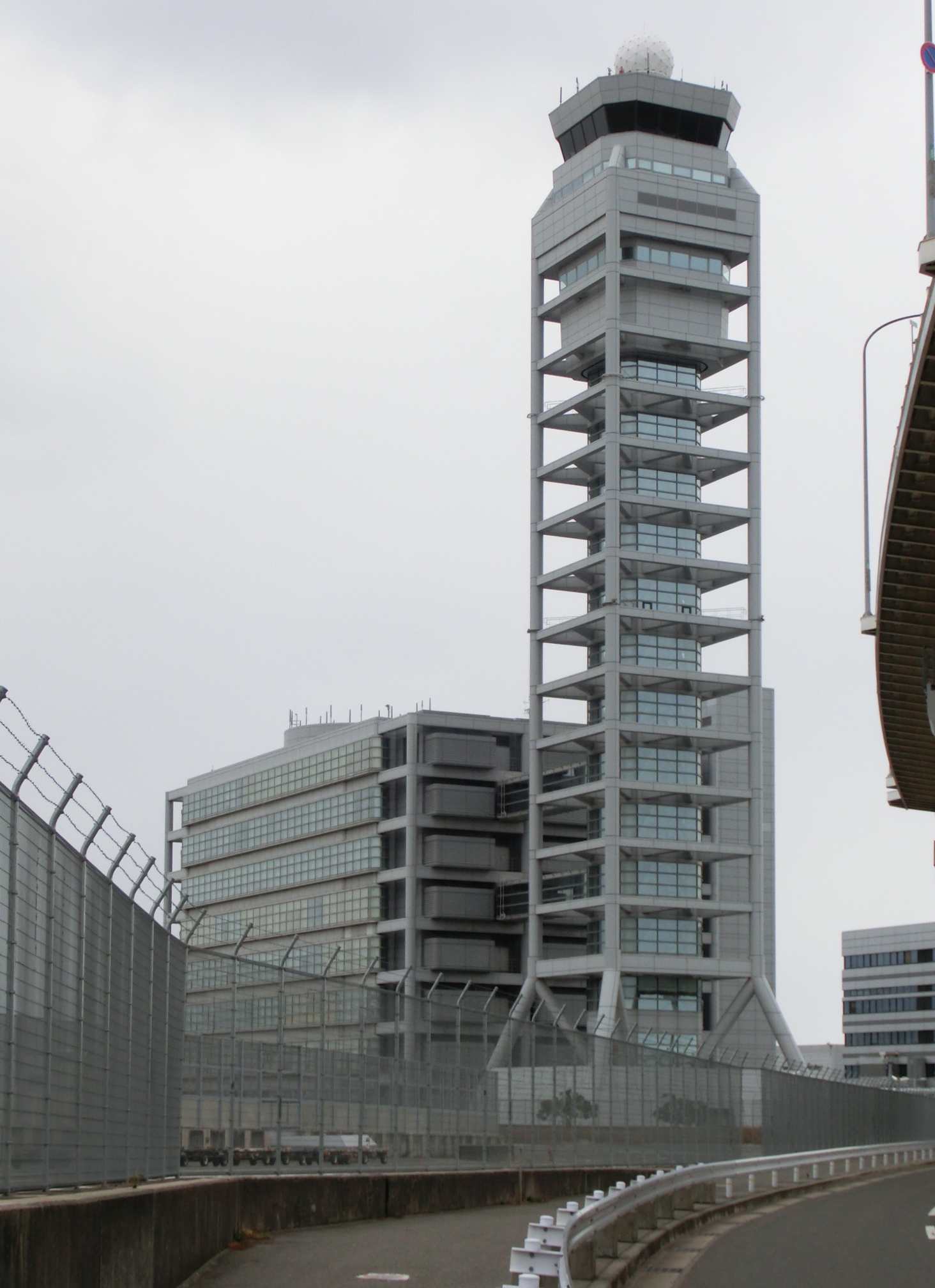 関西国際空港の管制塔（大阪航空局関西空港事務所・関西航空地方気象台）